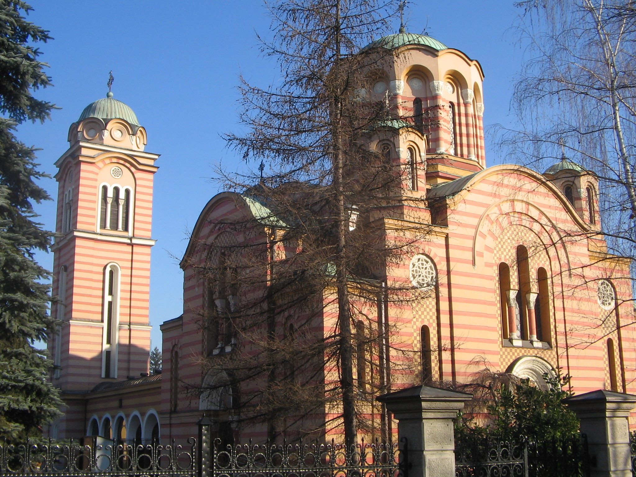 Храм_Свете_Тројице_у_Бањој_Луци